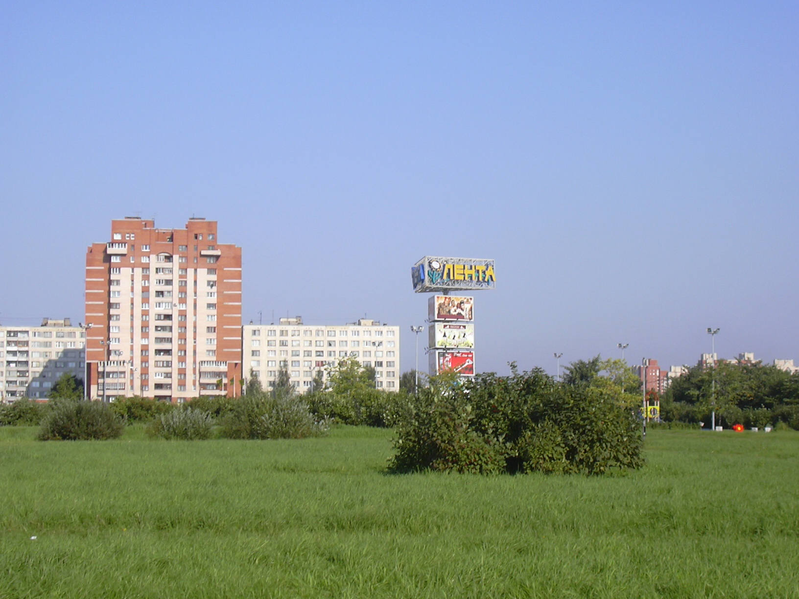 гипермаркет «Лента» на Бухарестской улице (Санкт-Петербург). гипермаркет «Лента» на Бухарестской улице.